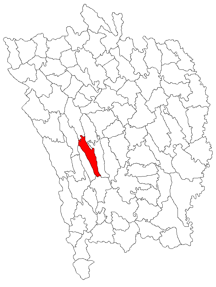 Categorie:Hărţi ale judeţului Vaslui